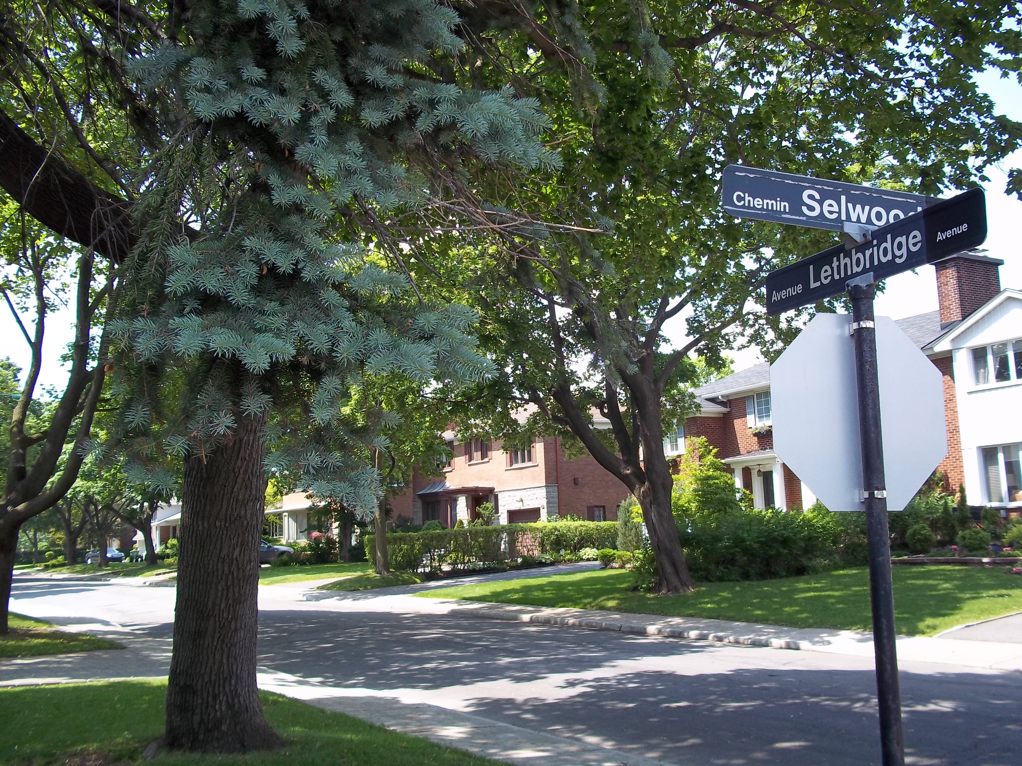 Aperçu du quartier résidentiel de Mont-Royal